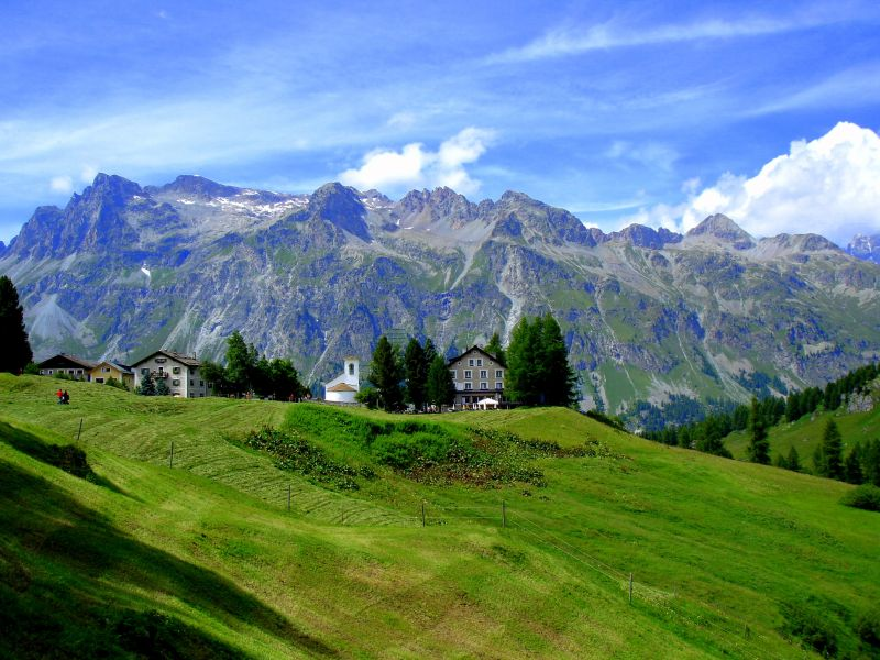 Panorama Val Fex